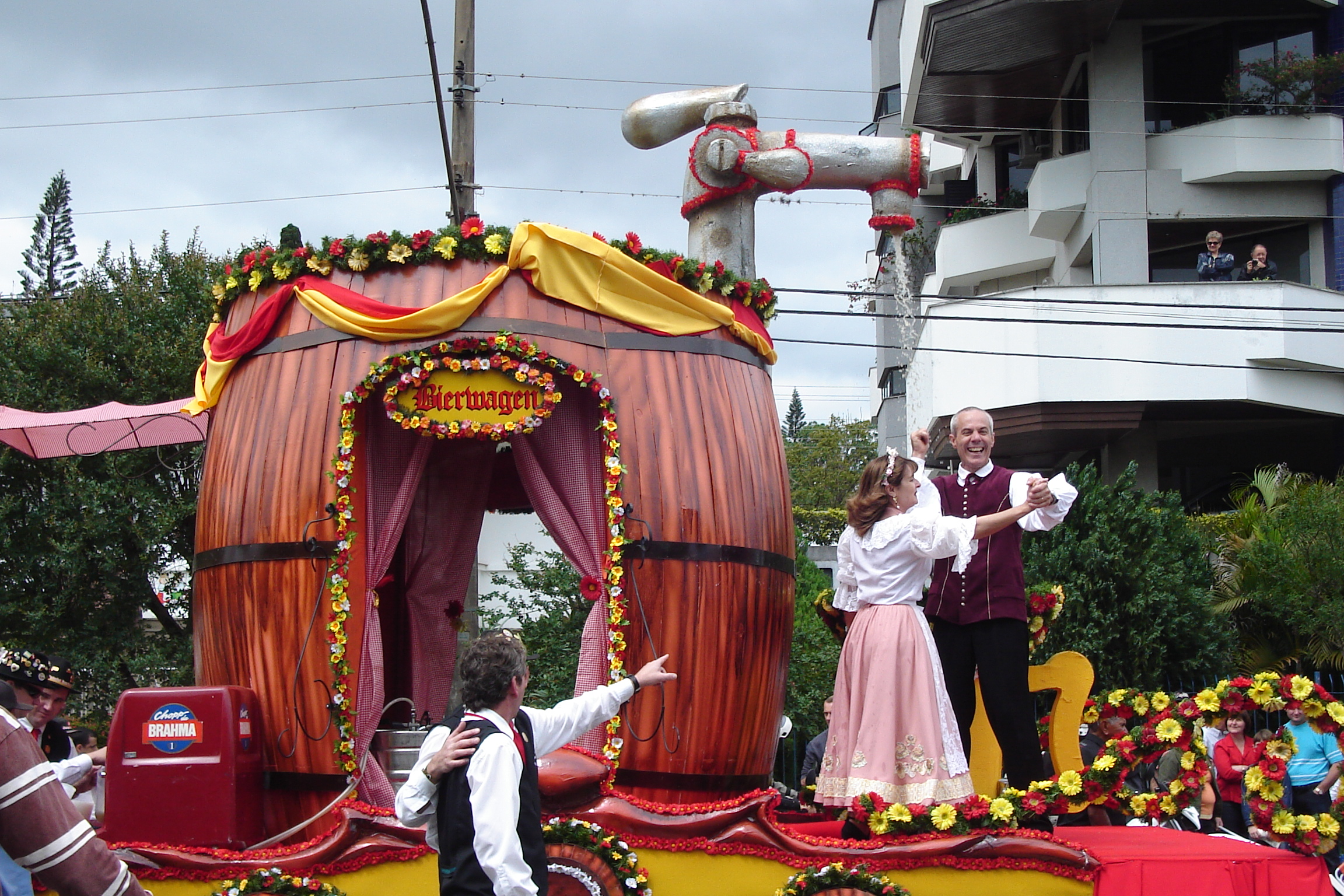 Bierwagen (carro cerveja) no desfile Oktoberfest em Santa Cruz do Sul, Brasil.